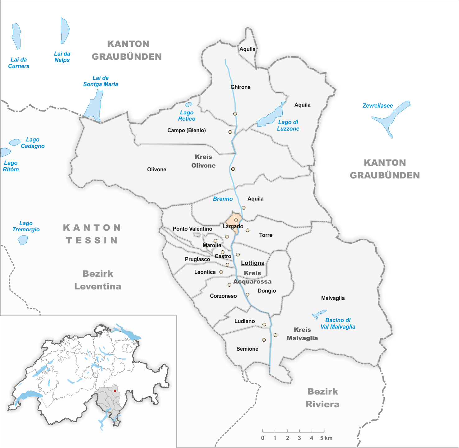 Municipality Largario